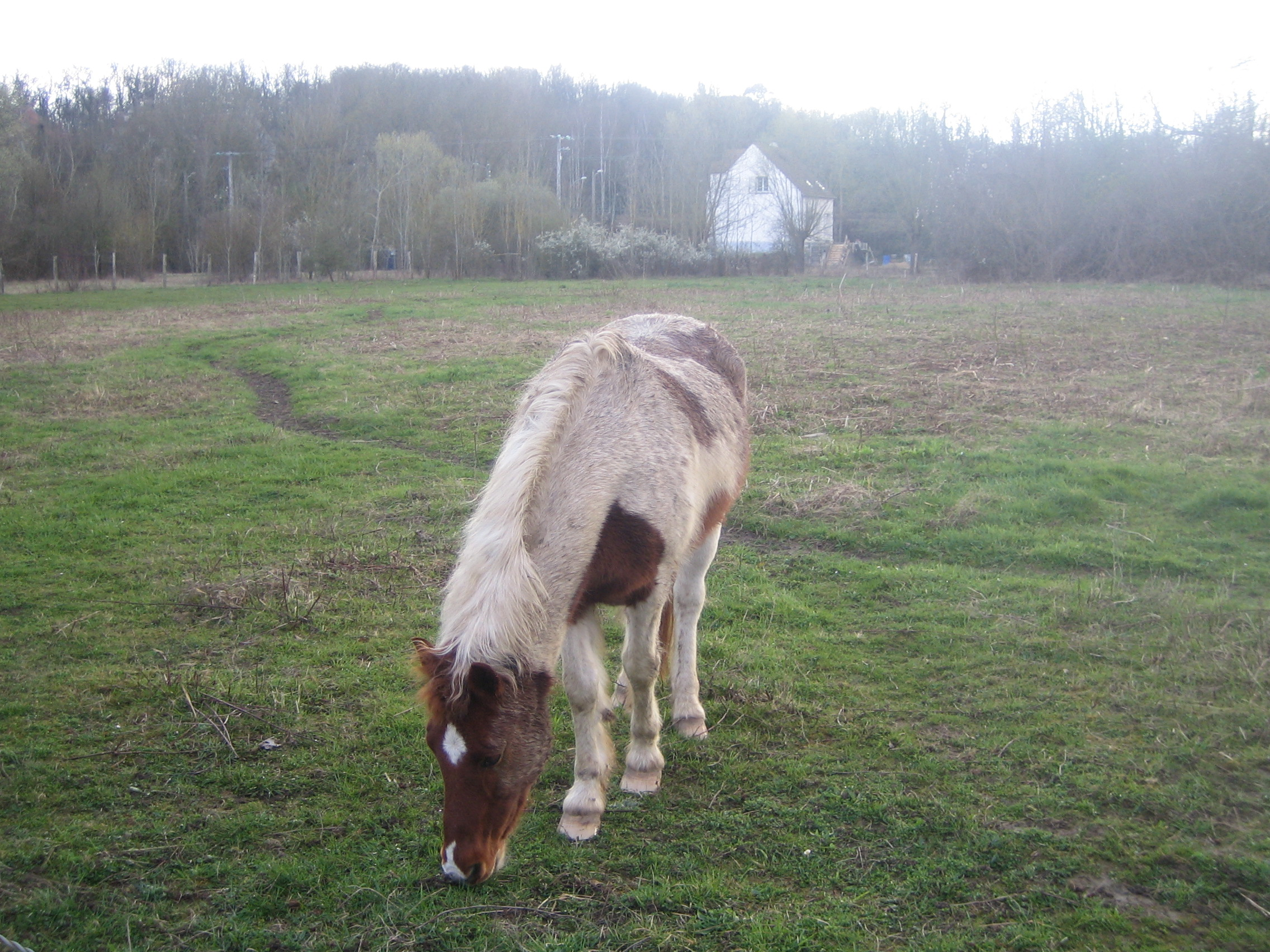 Cheval (equus ferus caballus) dans un pré à Boissise-le-Roi.